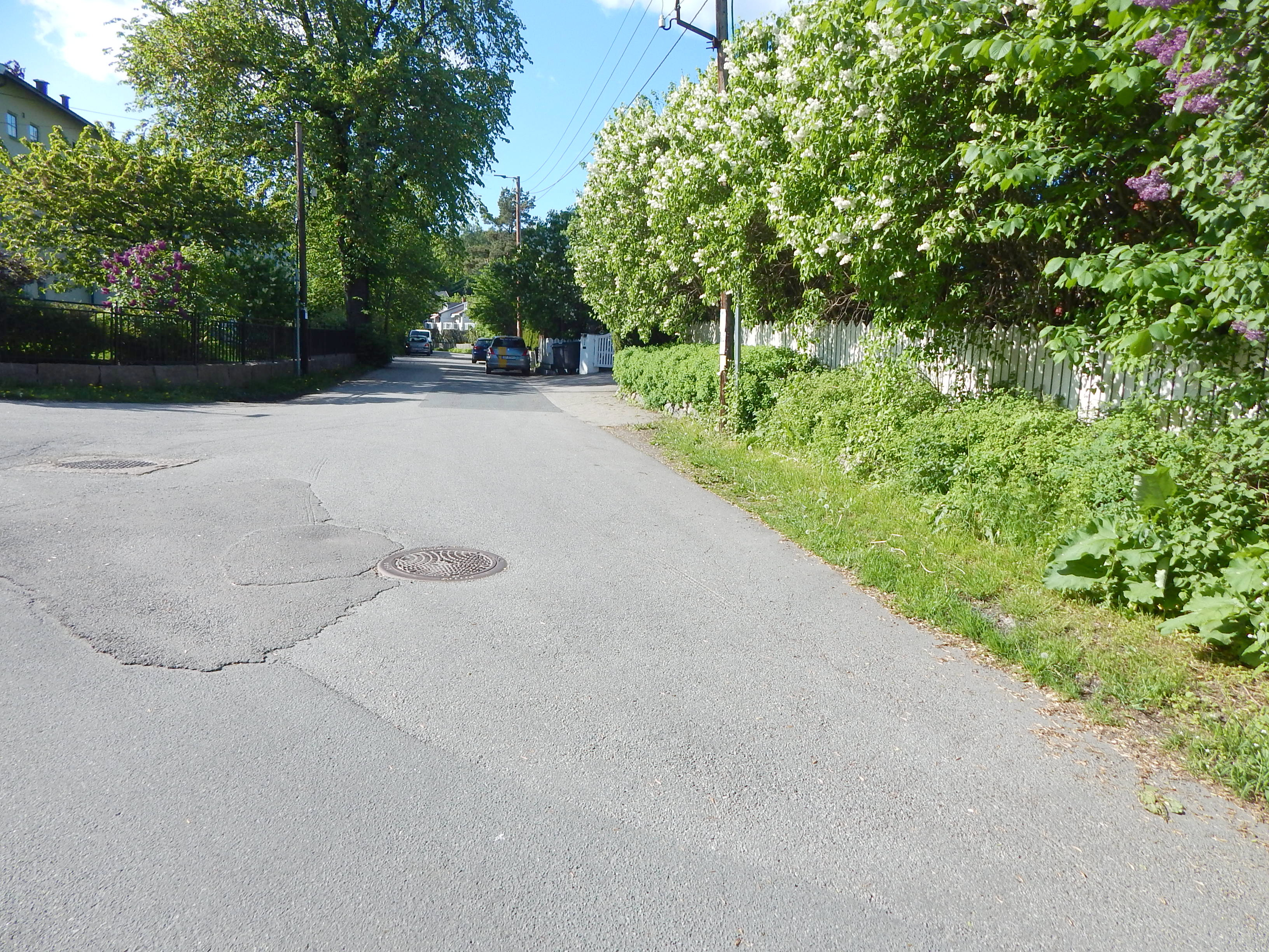 Kopperuds vei